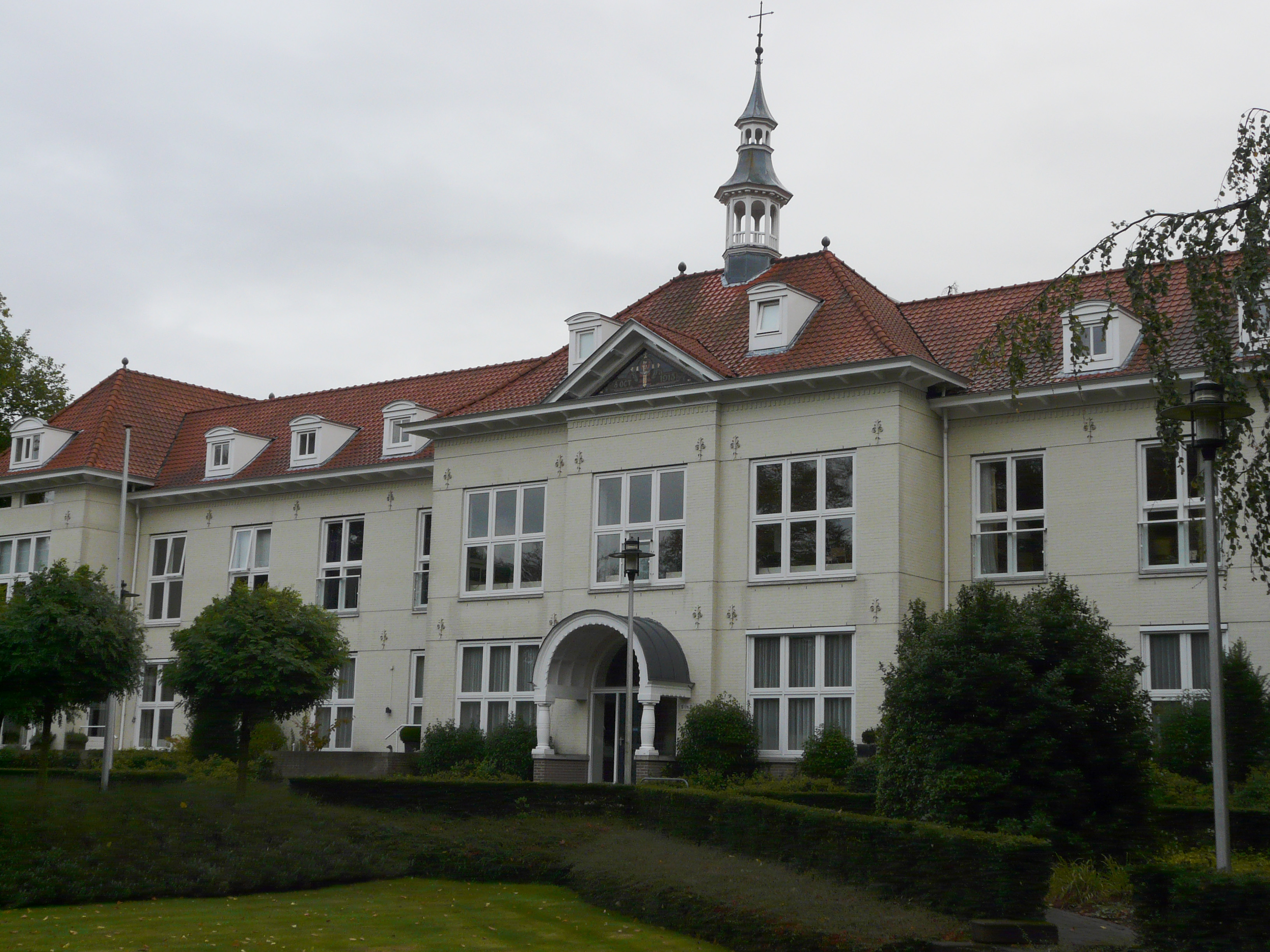 Voormalig Laurensziekenhuis aan de Ulvenhoutselaan in het Ginneken in het zuiden van Breda